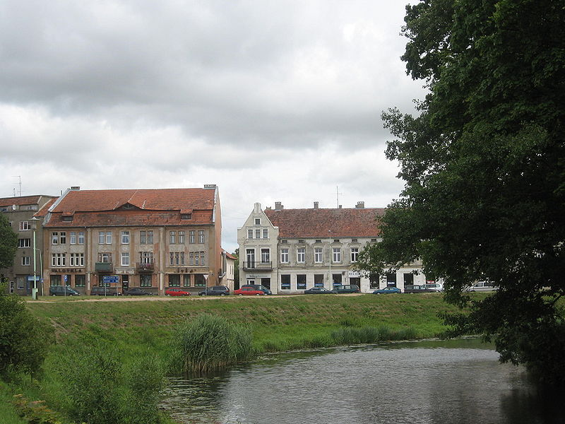 Šilutė.Senasis turgus.